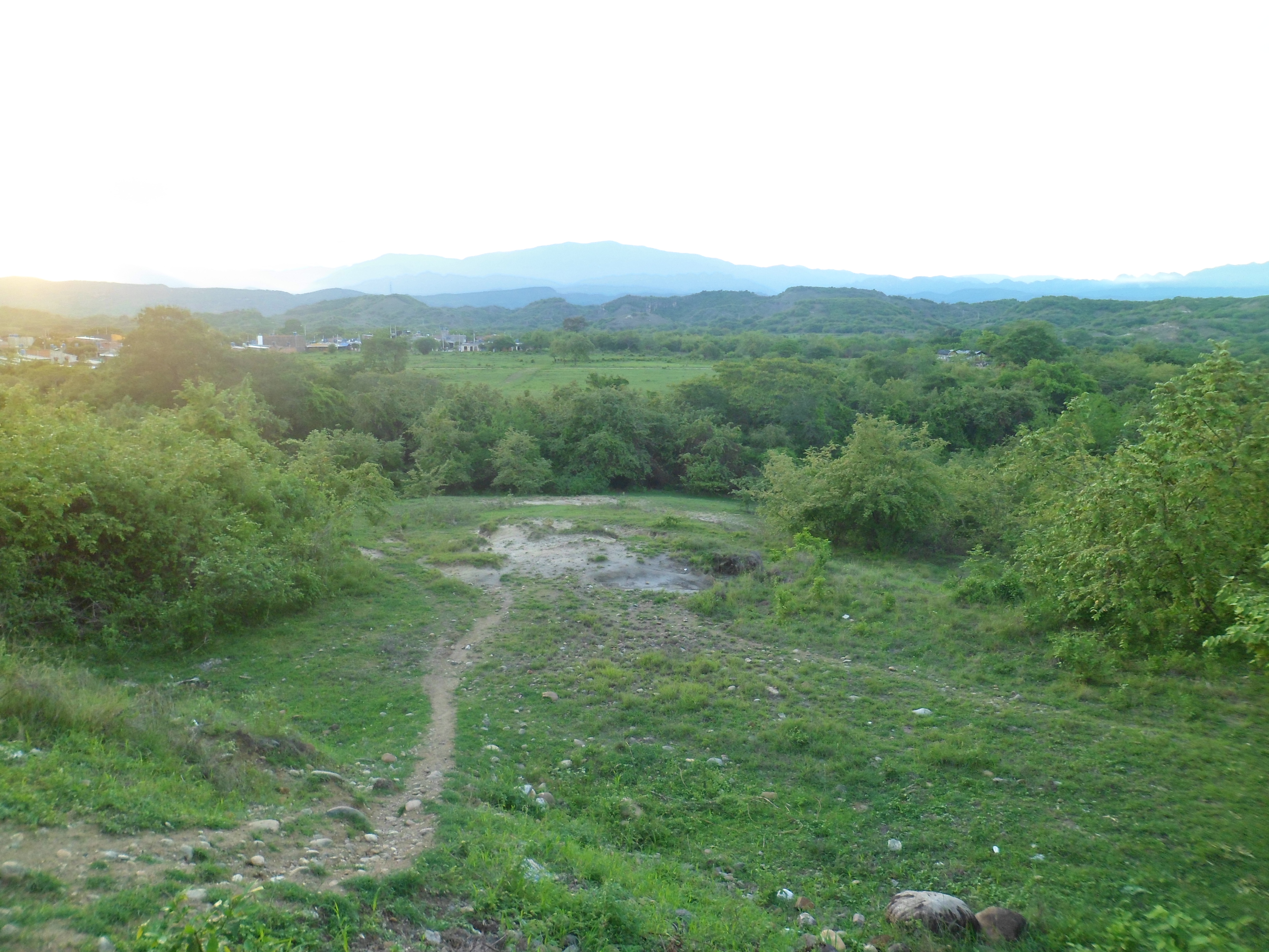 Barrios Occidente de Neiva